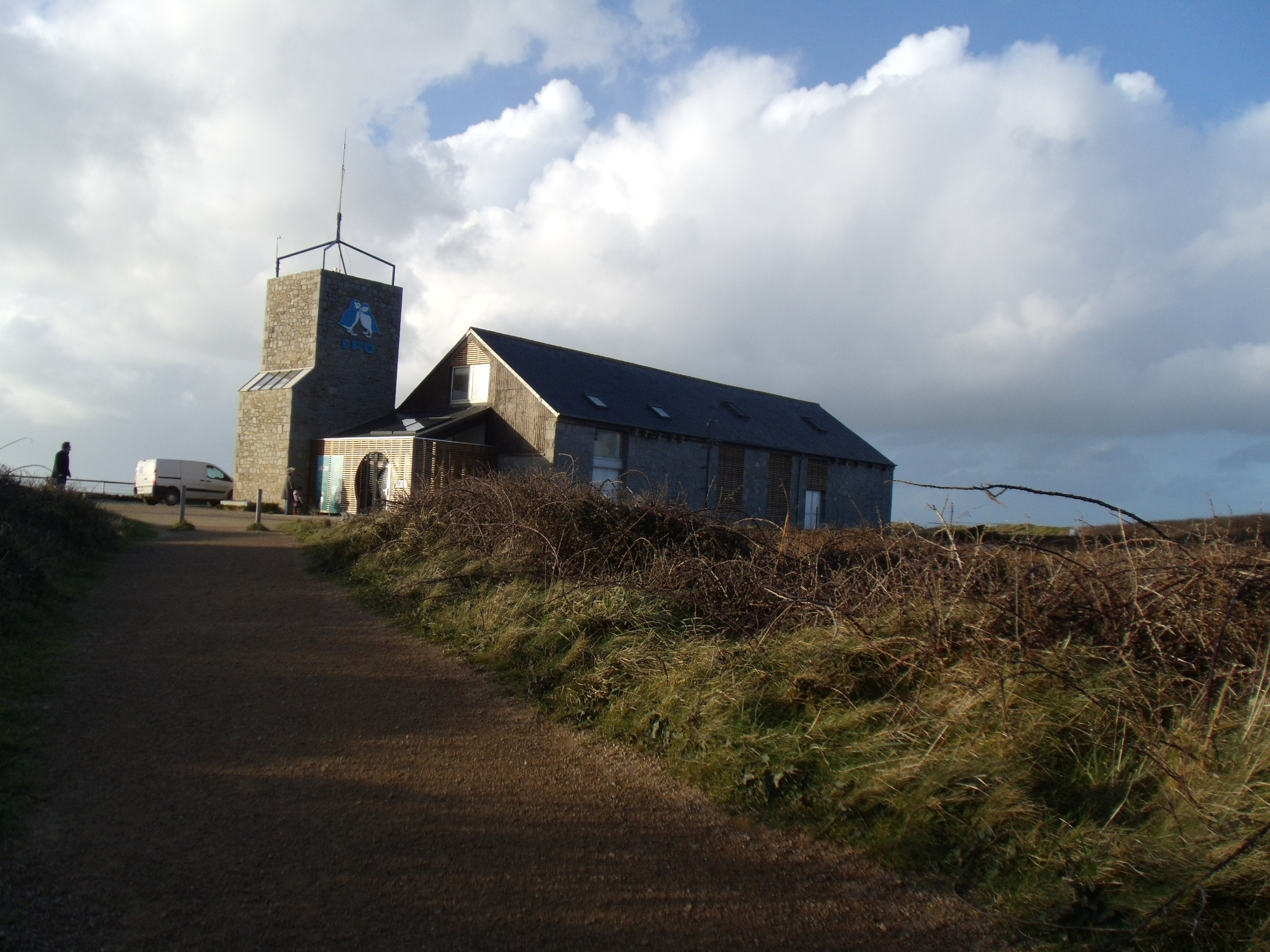 Le Bâtiment de la LPO à l'Île Grande